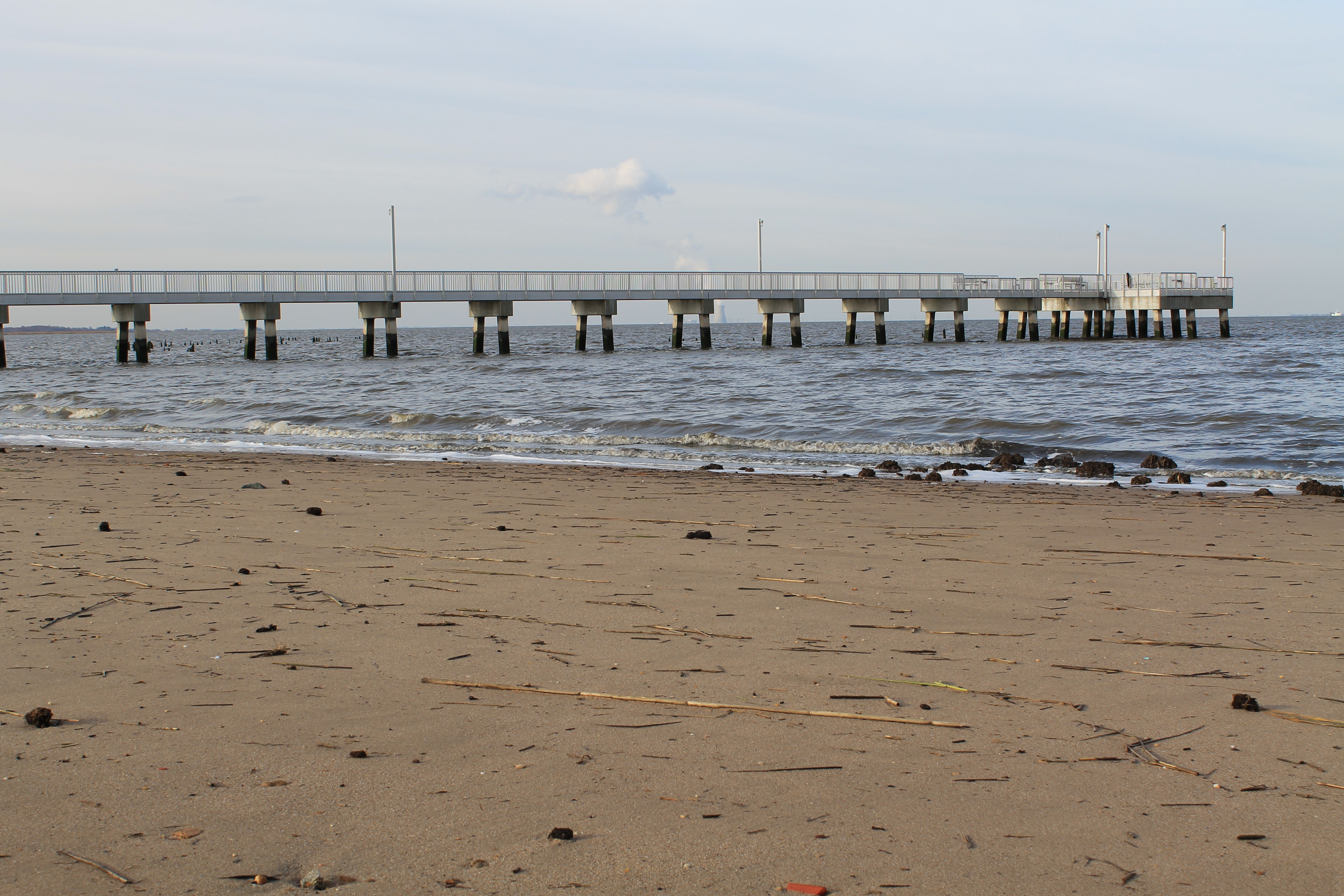 Smyrna